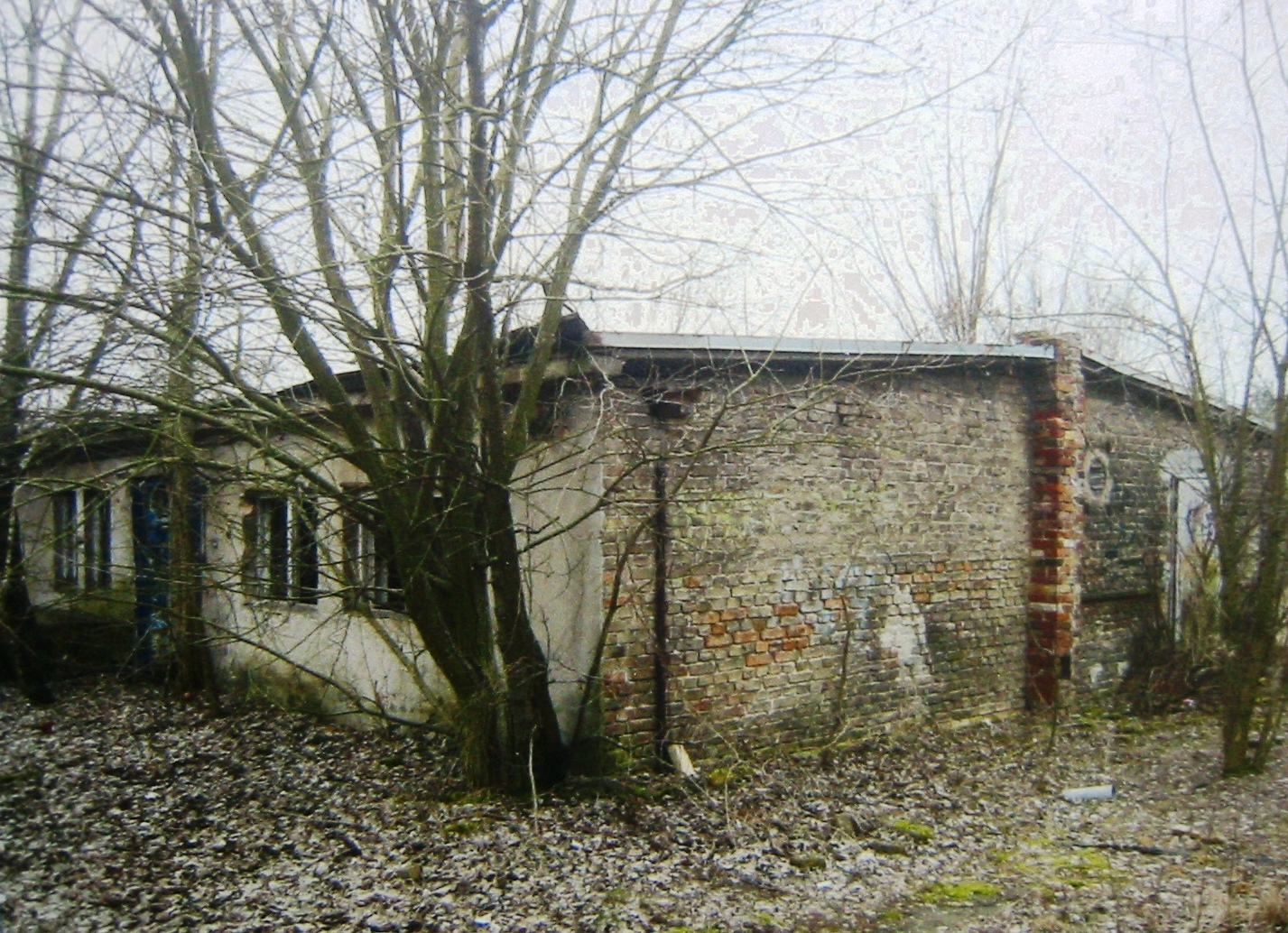 Foto der Unterkunftsbaracke 84A von 1944, die 2012 abgerissen wurde. Die Aufnahme stammt von Chrstina Czymay aus März 2012 und befindet sich auf einer öffentlich zugänglichen Informationsstele am ehemaligen Lager. Die Stele wurde vom Bezirksamt Marzahn-Hellersdorf von Berlin unter der Leitung von Christa Hübner, Dorothee Ifland, Lutz Prieß und Daniela Schnitter aufgestellt.